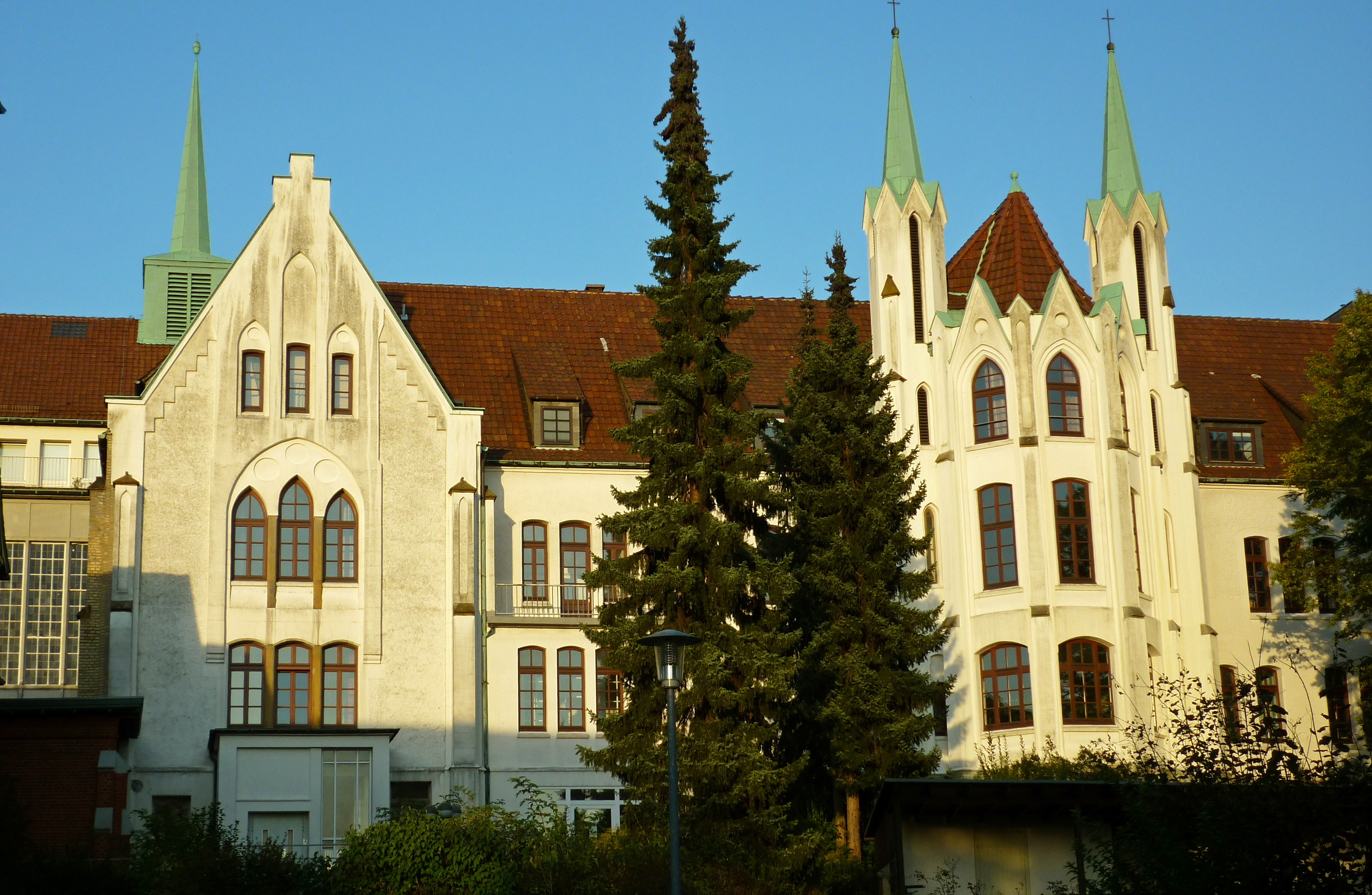 Bielefeld-Gadderbaum, evangelische Stiftungen Bethel. Haus Sarepta (Diakonissenmutterhaus), erbaut 1872–1875 im neugotischen Stil.